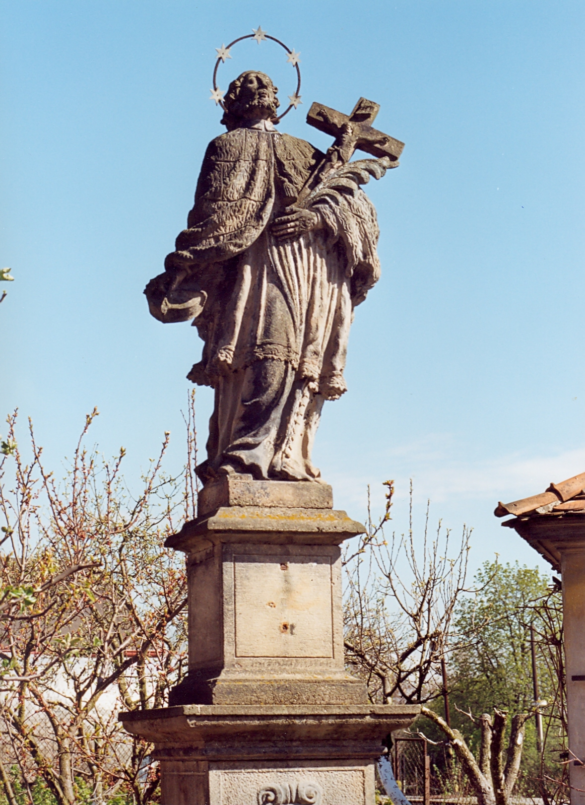 Socha sv. Jana Nepomuckého (Trnovany), u čp. 23, Trnovany